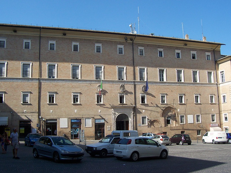 Macerata - Palazzo dei Priori (Prefettura)